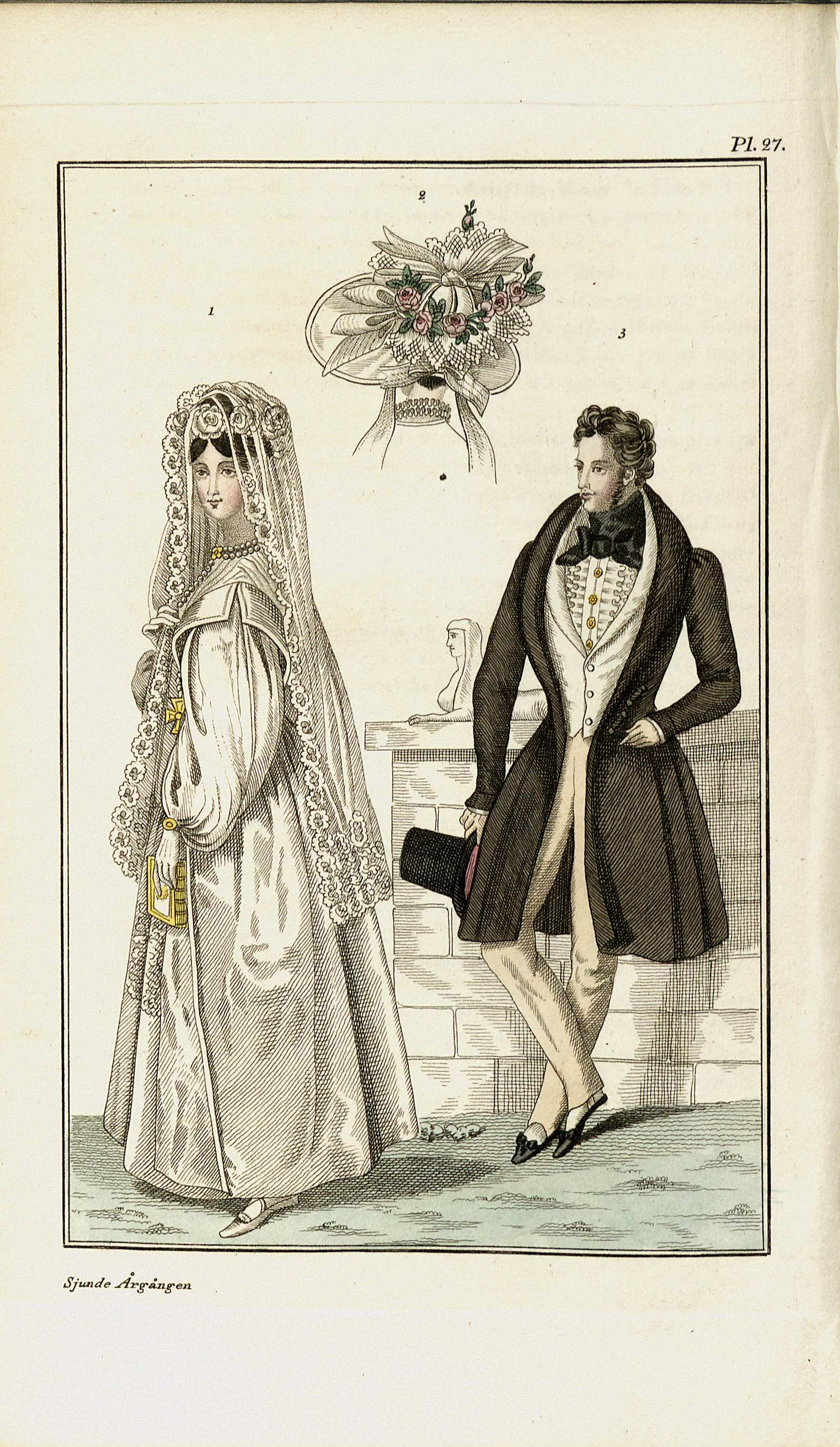 Londonmode; Parismode; Brudklänning; Klänning; Slöja; Hatt; Halsduk; Bonjour; Rock; Väst; Pantalonger